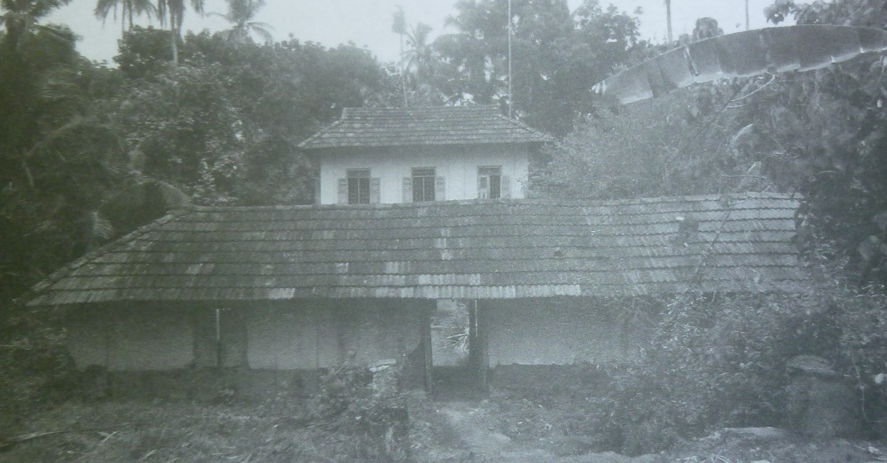 ആവിണിശ്ശേരിയിലെ വി. ആർ. കൃഷ്ണനെഴുത്തച്ഛന്റെ ജന്മഗൃഹം